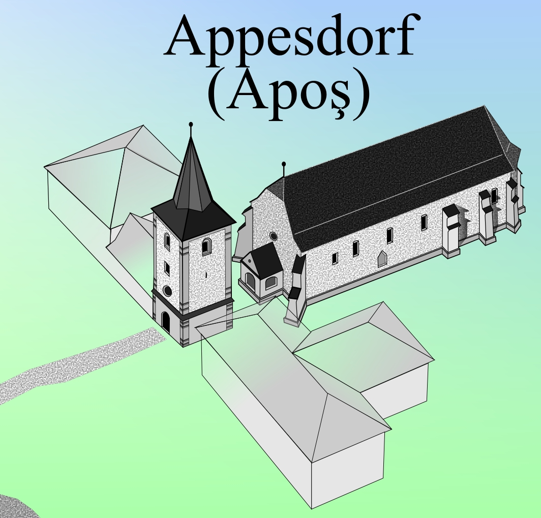 Macheta pentru biserica evanghelica din Apos, Sibiu.